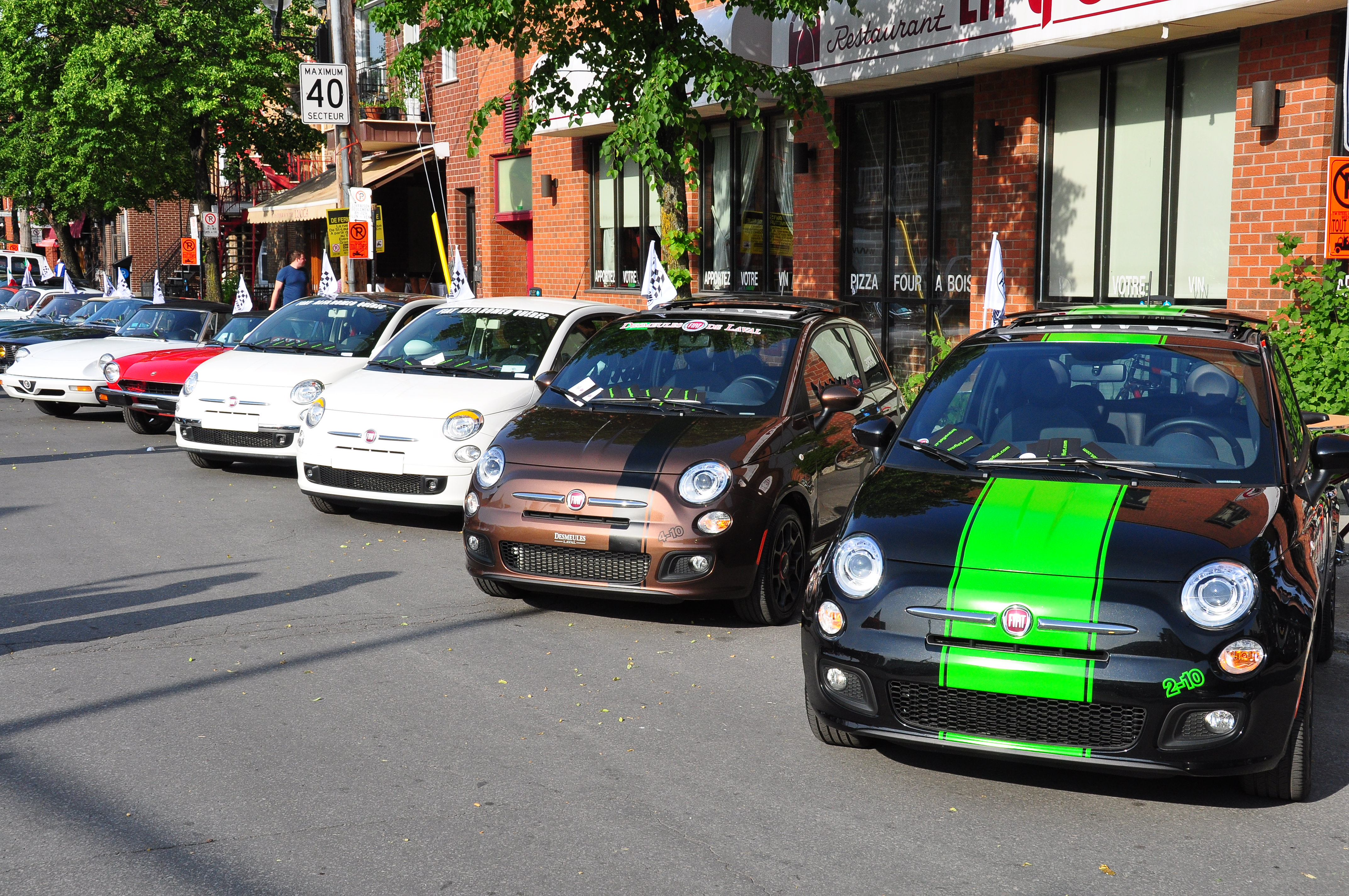 TW Steel Grand Prix weekend 2011